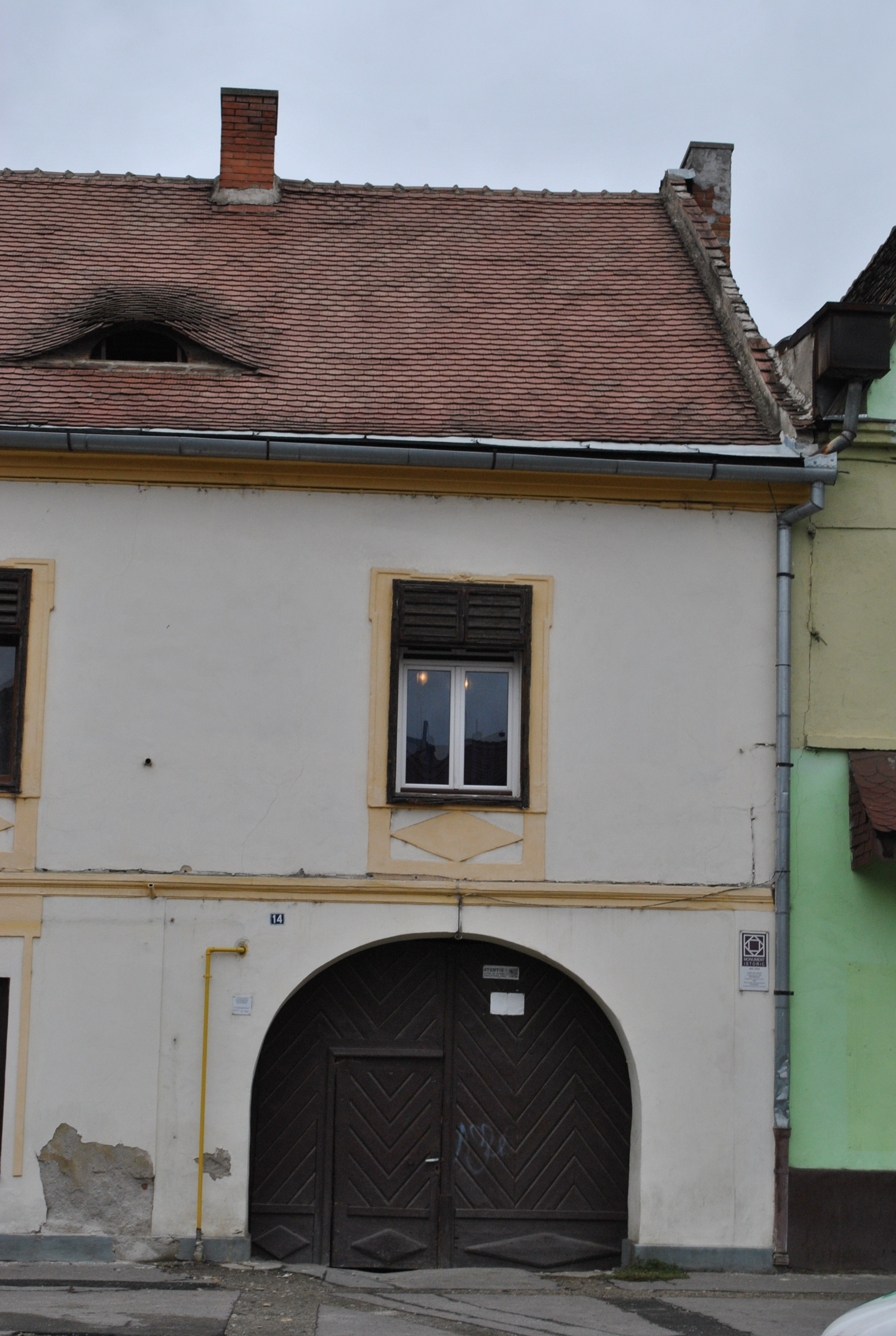 Casă, fragmente sec. XIV, sec. XVIII